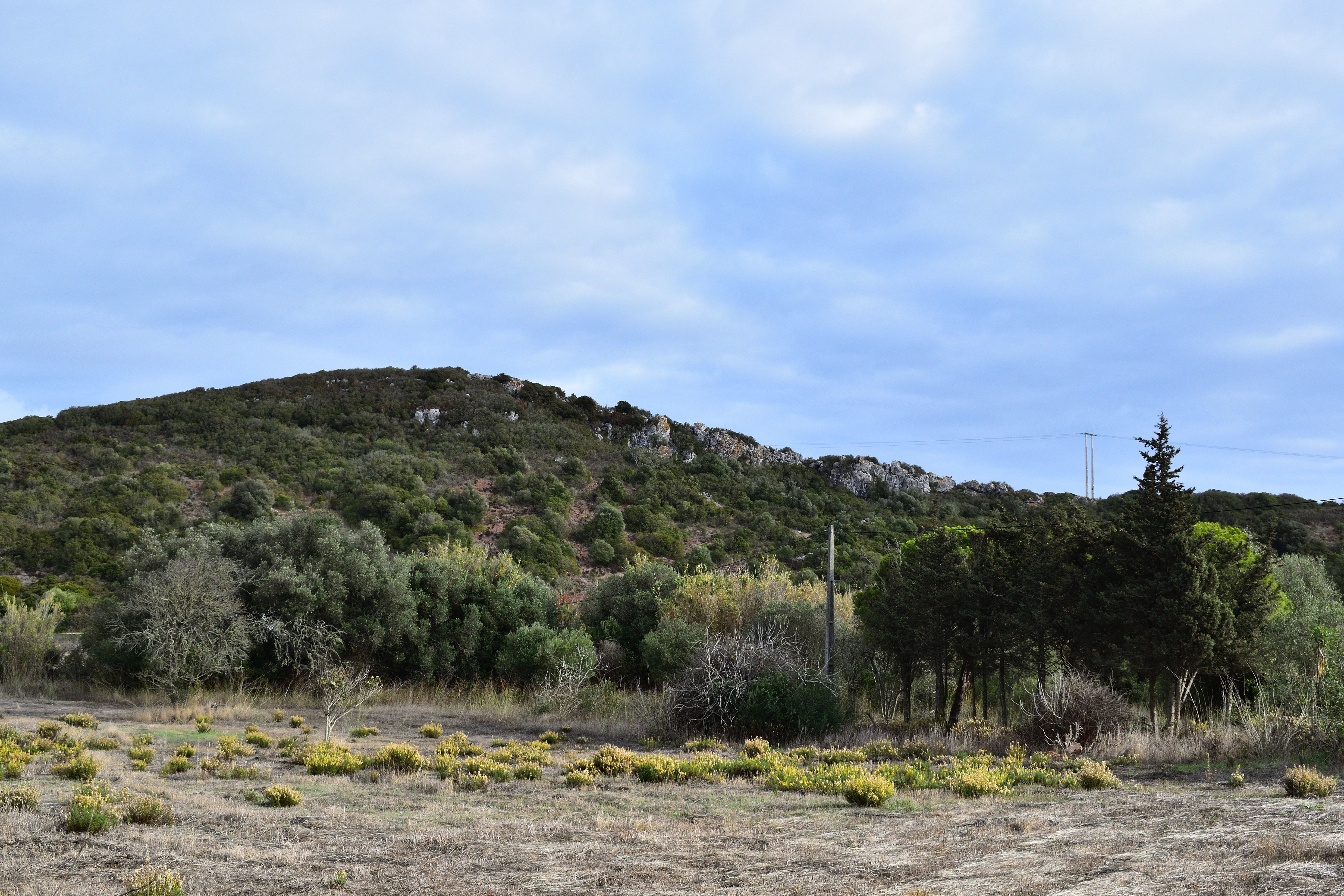 Colina perto da aldeia de Vale de Boi, no concelho de Vila do Bispo, em Portugal. Nesta elevação foram encontrados vestígios pré-históricos.